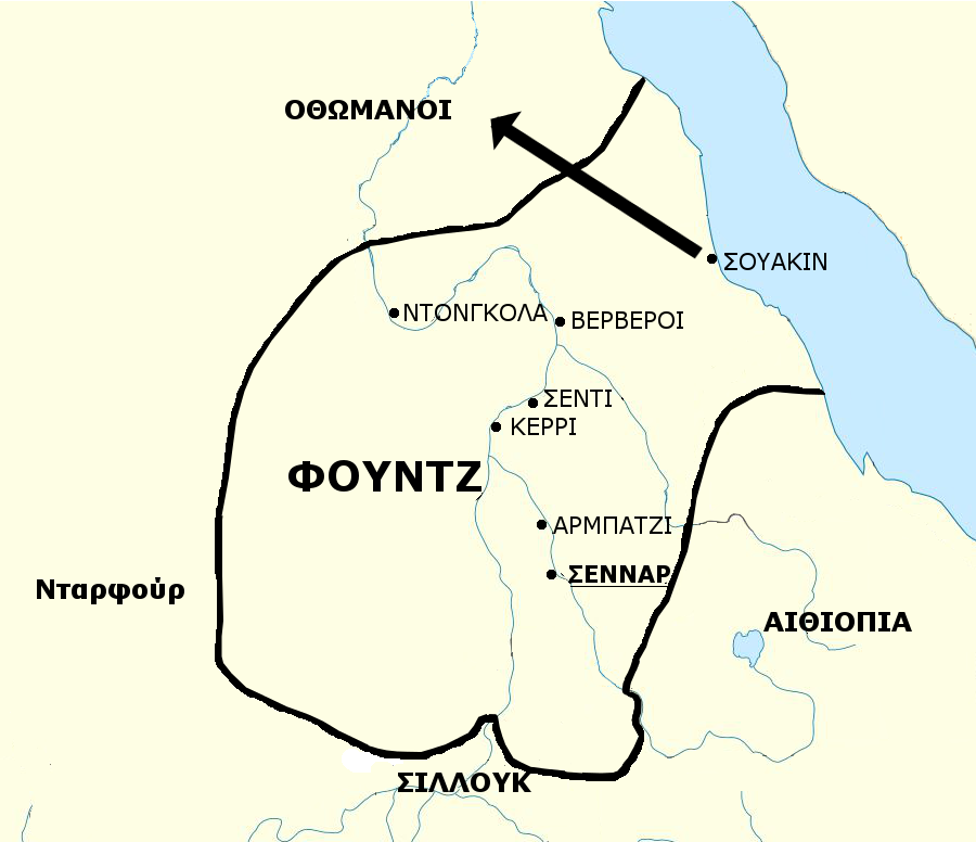 Το Σουλτανάτο Φουντζ το 1700 μ.Χ.